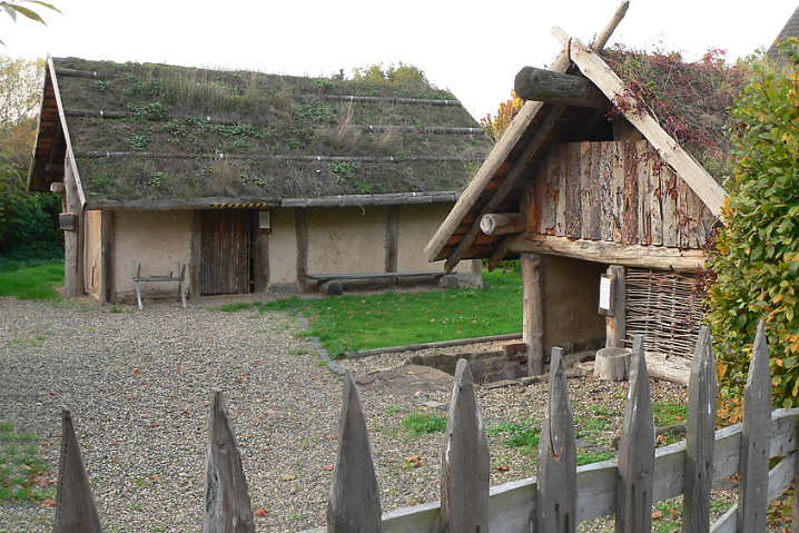 Mittelalterdorf Fritzlar Geismar